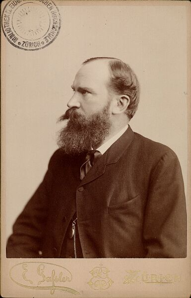 Porträt von Eduard Gerlich